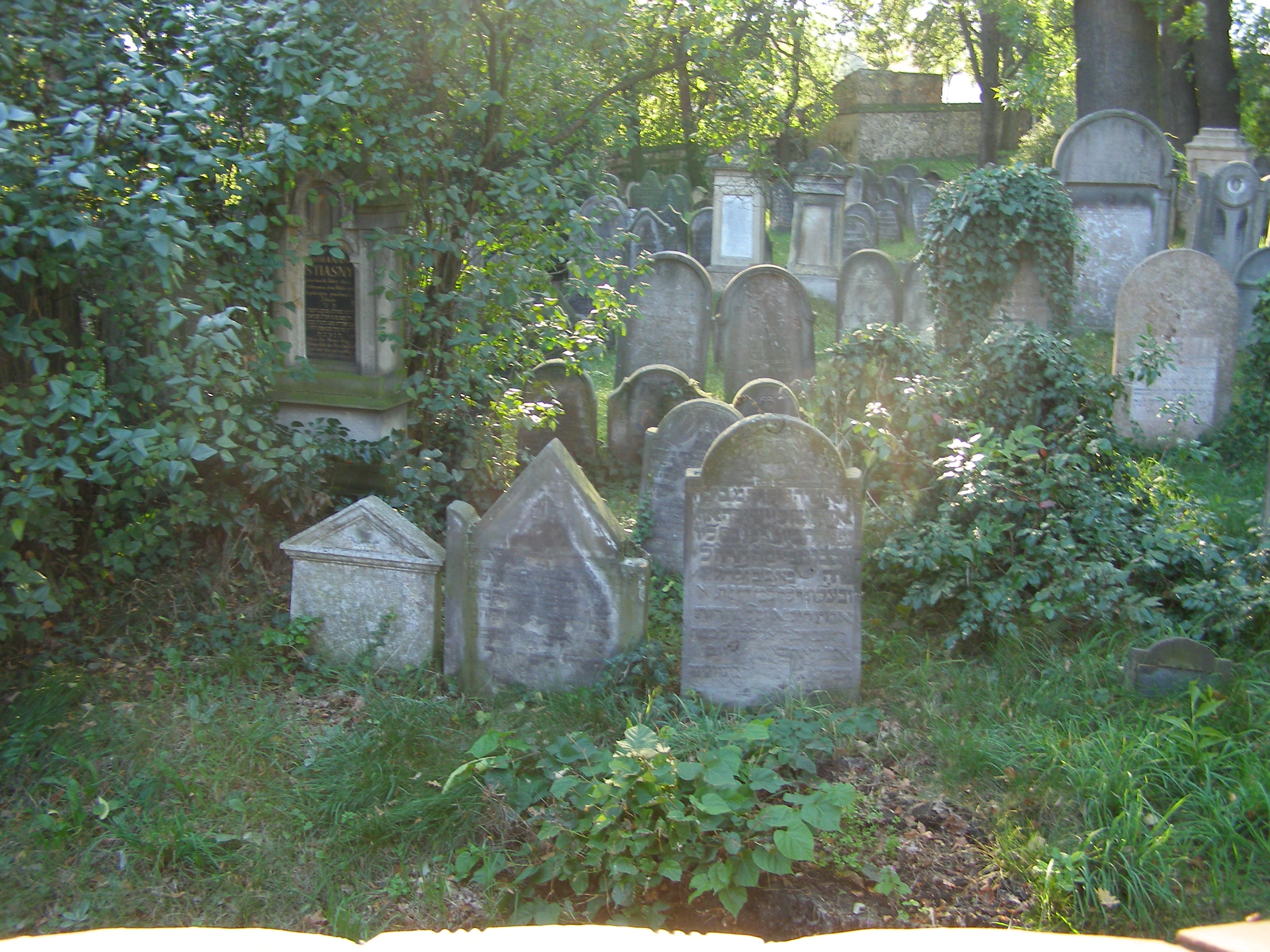 Židovský hřbitov (Brandýs nad Labem), Kostelecká, Brandýs nad Labem